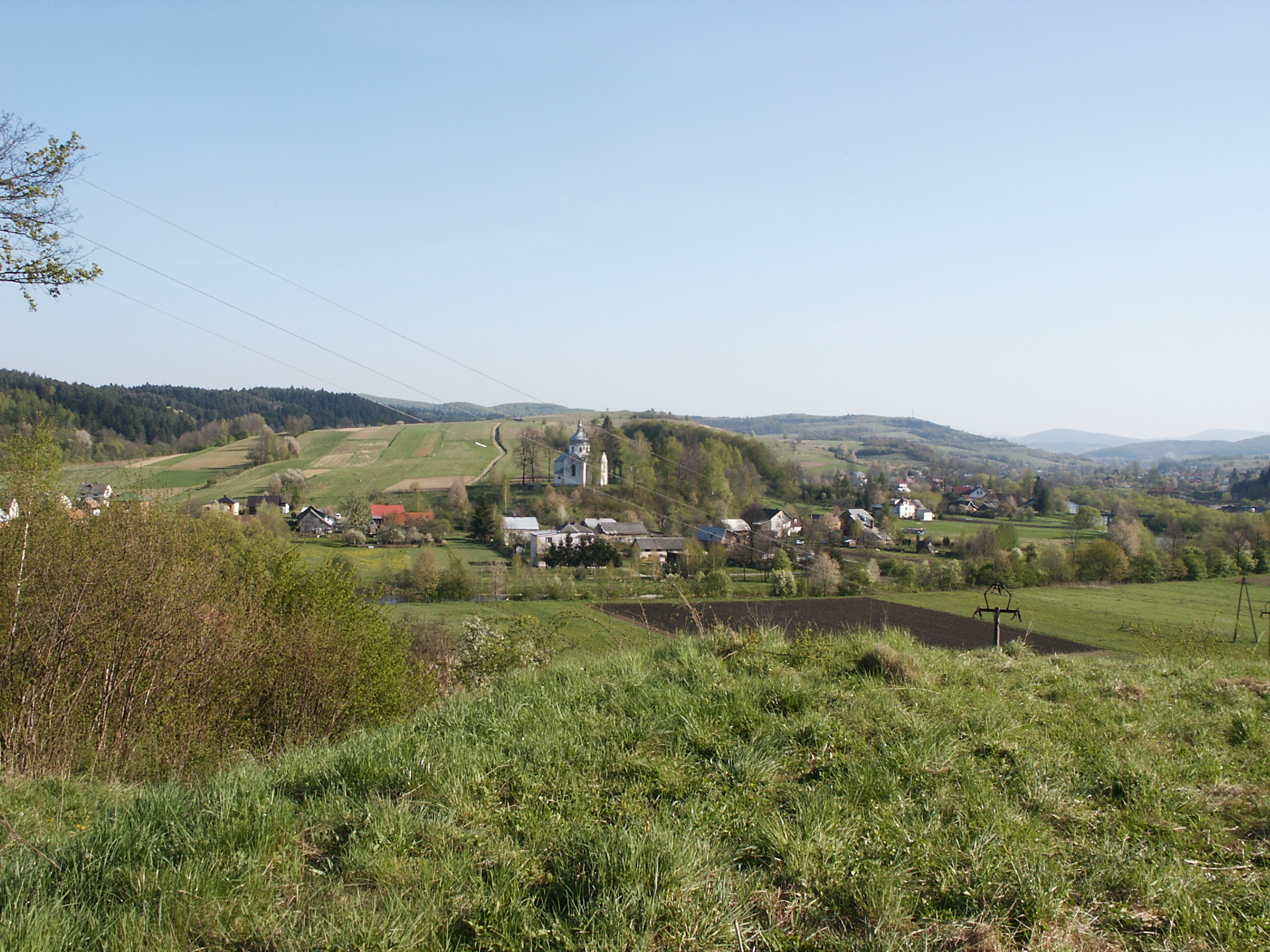 widok Wielopola